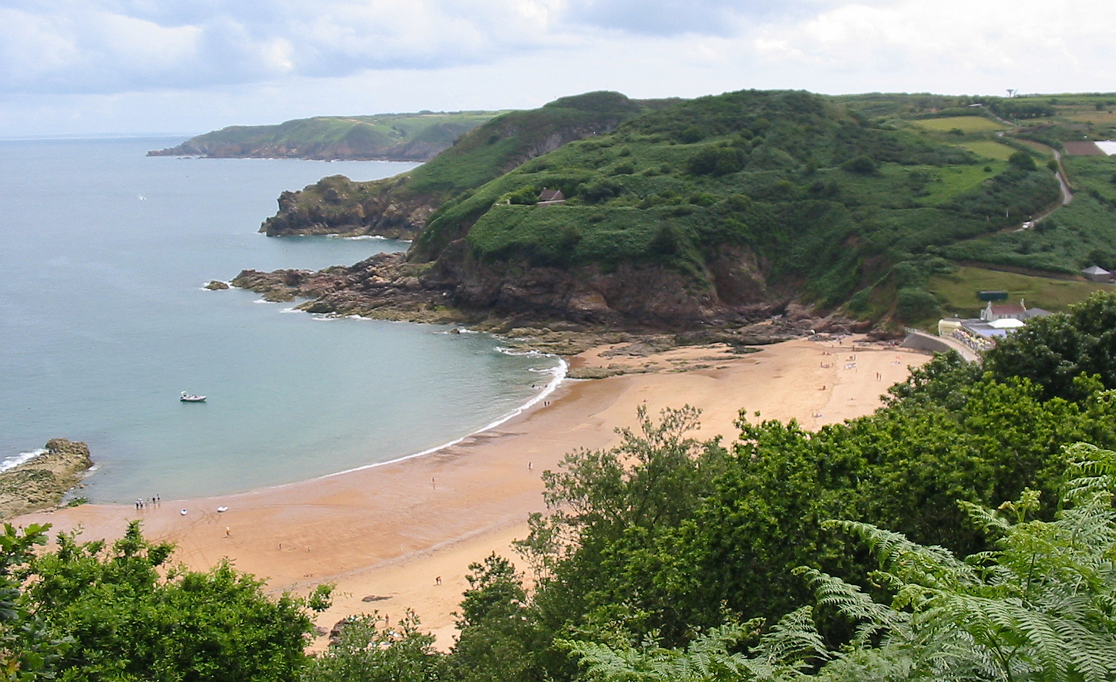 Nrf: Saint Ouën, Jèrri, 5 d'Juilet 2009